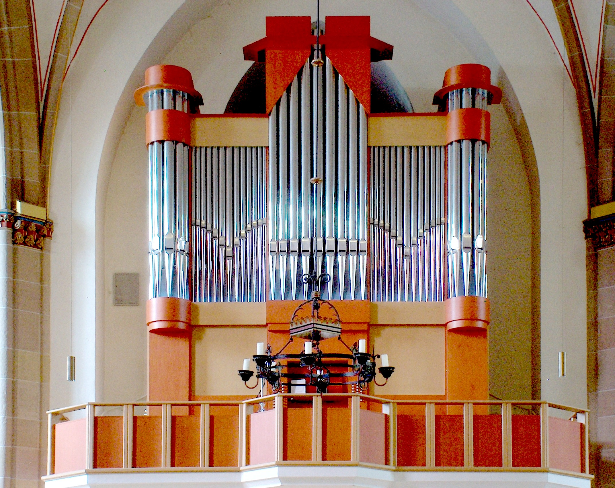 Prospekt der Woehl-Orgel (1999) in Sendenhorst, St. Martinus